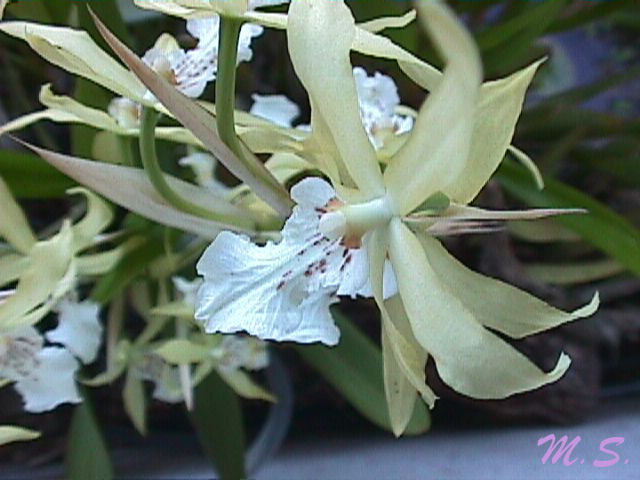 Miltonia Flavescens en flor